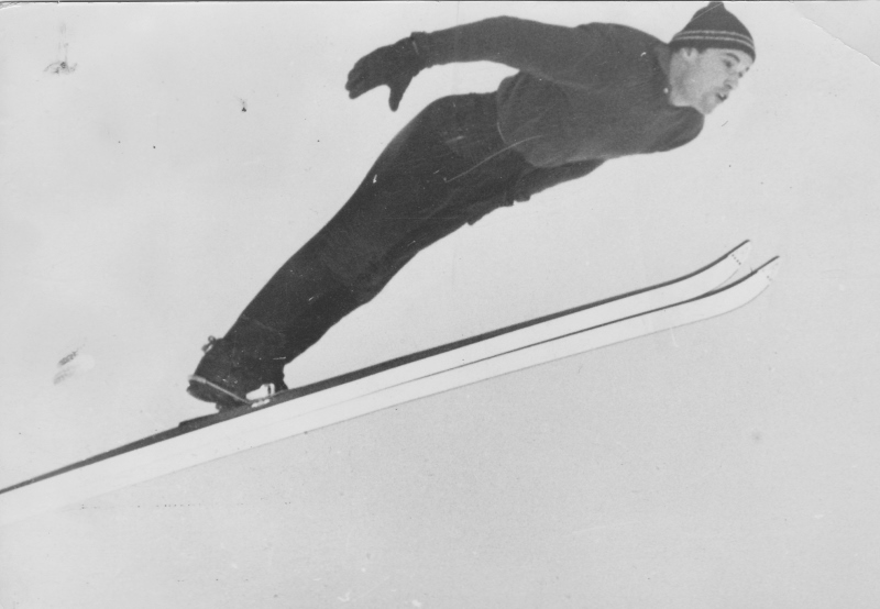 Razglednica Marjana Pečarja.